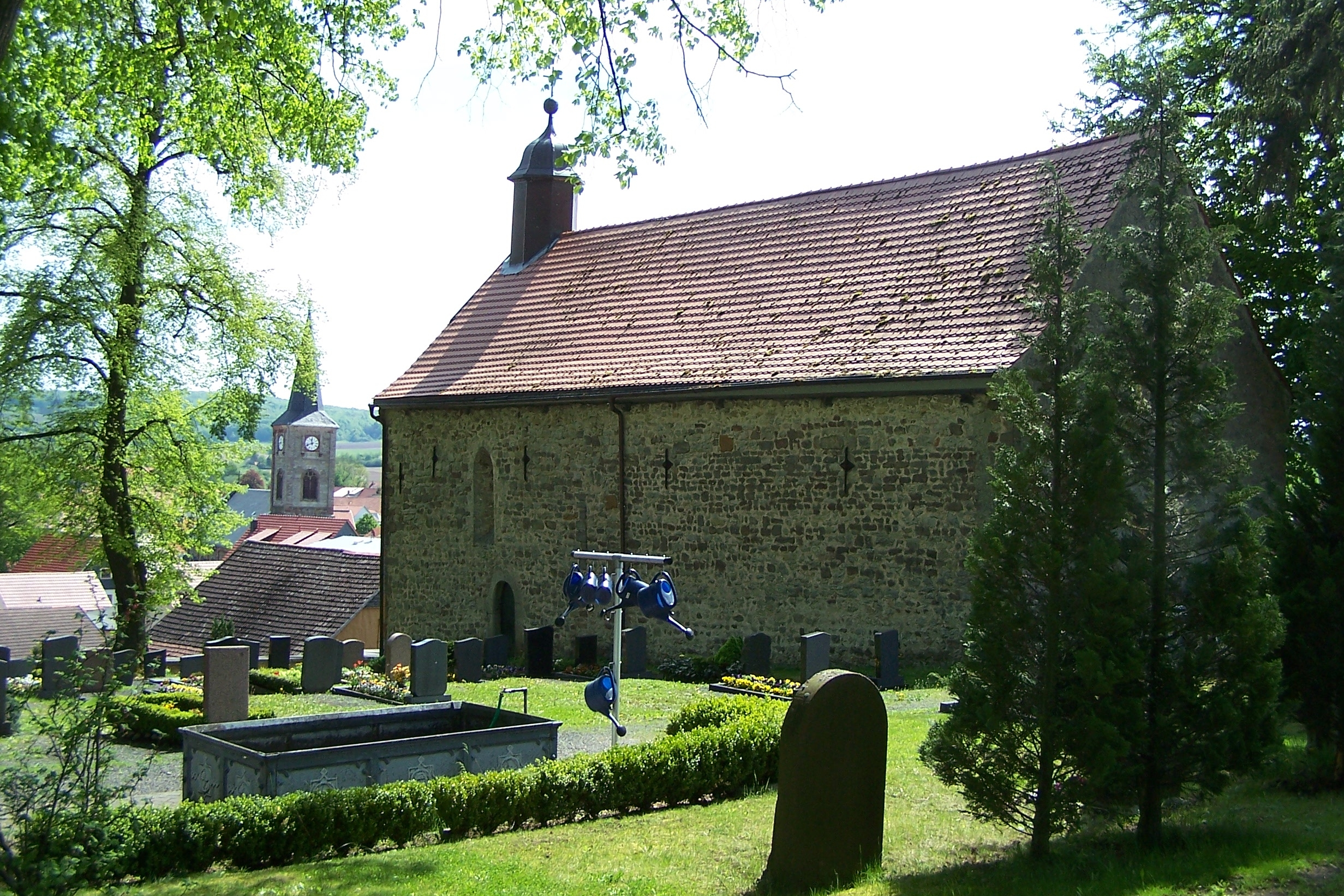 Teilansicht von Nordwesten, im Hintergrund die Nikolaikirche der Stadt.